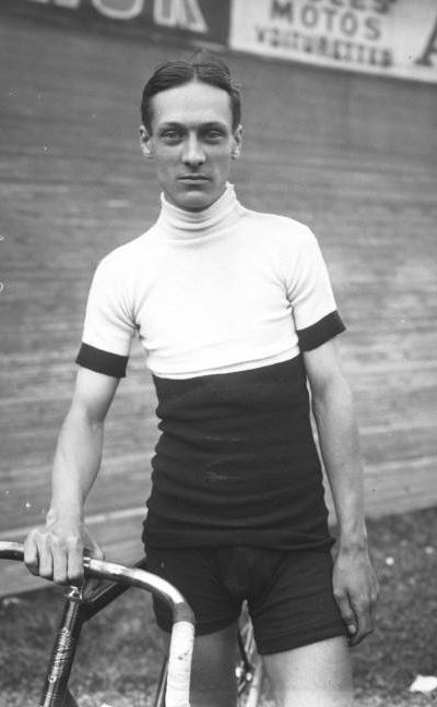 Eigeldinger, portrait du coureur cycliste à côté de son vélo